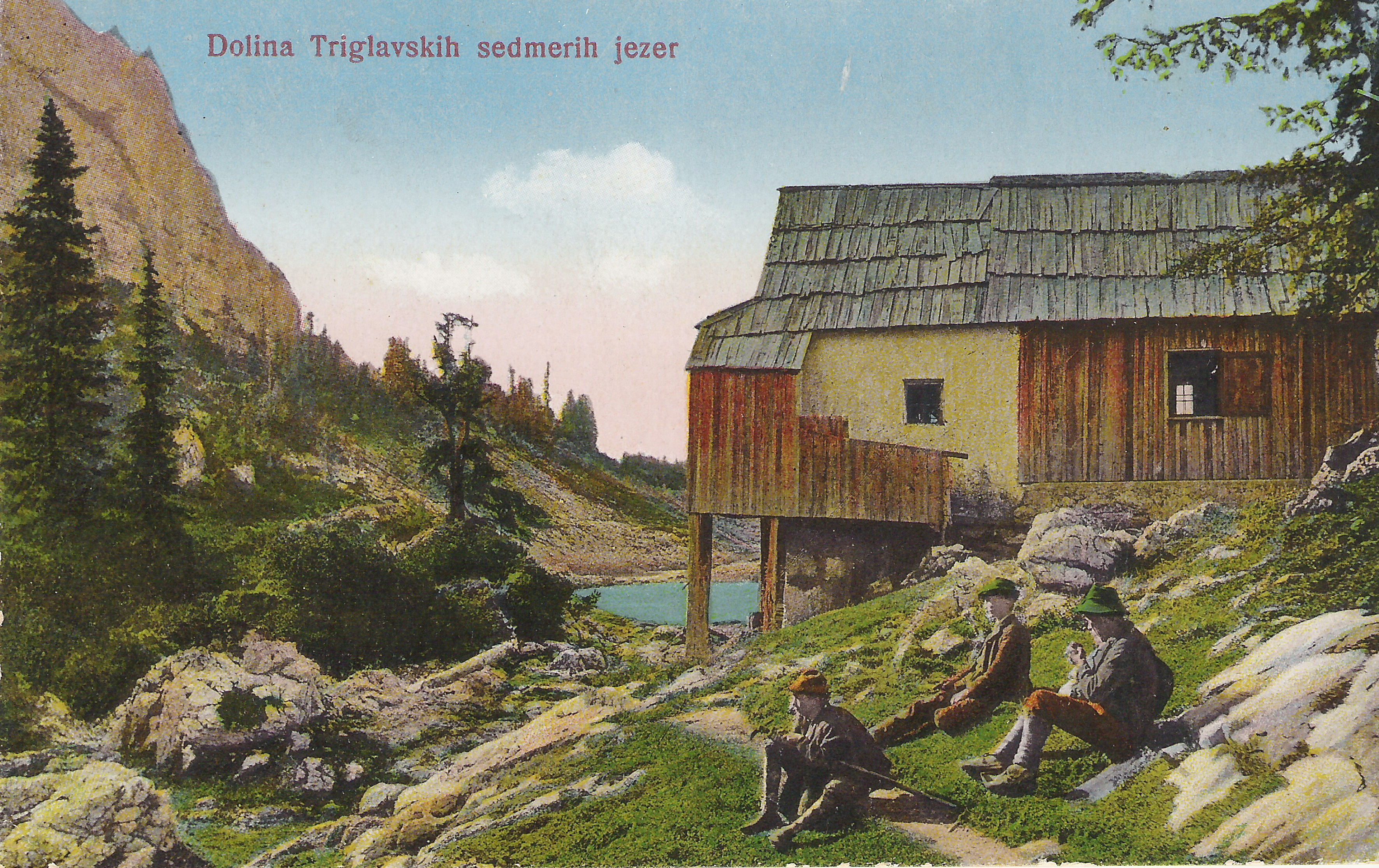 Razglednica Ferdinandovega zavetišča.